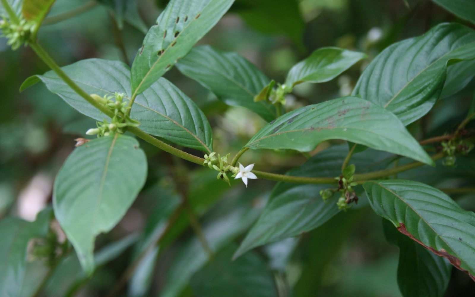 Sabicea panamensis, Kaffeegewächse (Rubiaceae) - Costa Rica: Prov. Puntarenas, La Gamba NW Golfito, "Laguna" zwischen "Tropenstation La Gamba"/"Estación Biológica La Gamba" und "Esquinas Rainforest Lodge"